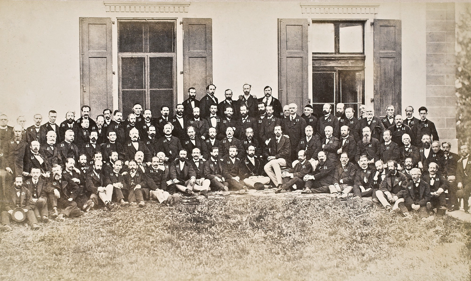 Junta de Vevey. Suiza, 19 de abril de 1870. Fotografía que documenta el congreso que hubo en Vevey, Suiza, en el que participaron destacados miembros carlistas que rodean a Don Carlos de Borbón. Se realizó delante de la casa de Don Carlos a las dos de la tarde el segundo día de las reuniones